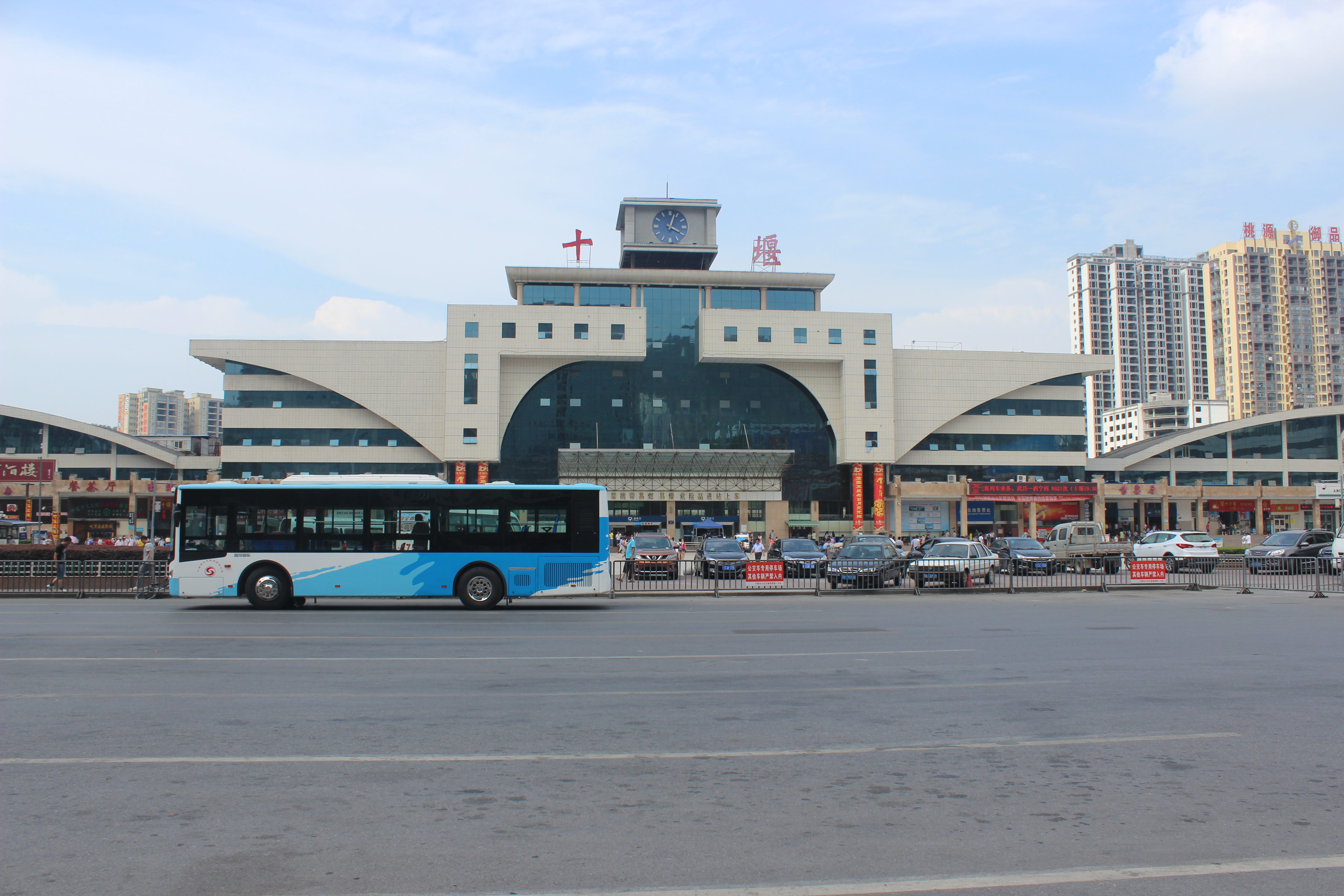 中华人民共和国铁路路徽 十堰站 站名拼音 中华人民共和国铁路路徽 十堰站 站名拼音 Shinan Zhan 英文名称 Shiyan Railway Station 车站功能 客货站 车站位置 湖北省十堰市 管辖权归属 武汉铁路局 途经线路 襄渝铁路 车站等级 一等站 使用状态 使用中 - 正线 2条